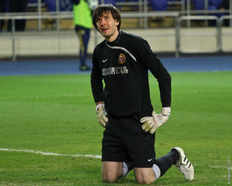 Дмитрий Александрович Безотосный — украинский футболист.